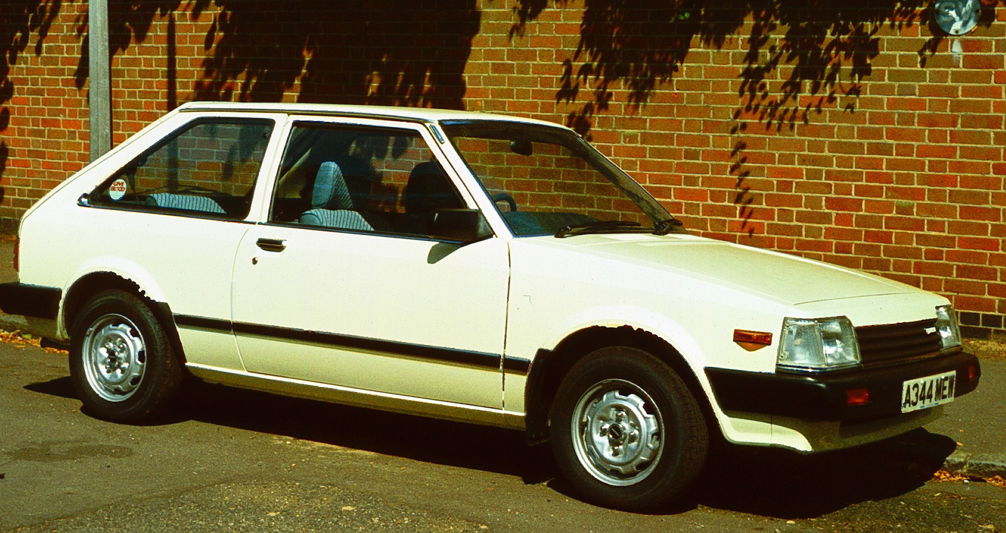 Mazda 323 1982 Jesus Lane Cambrige